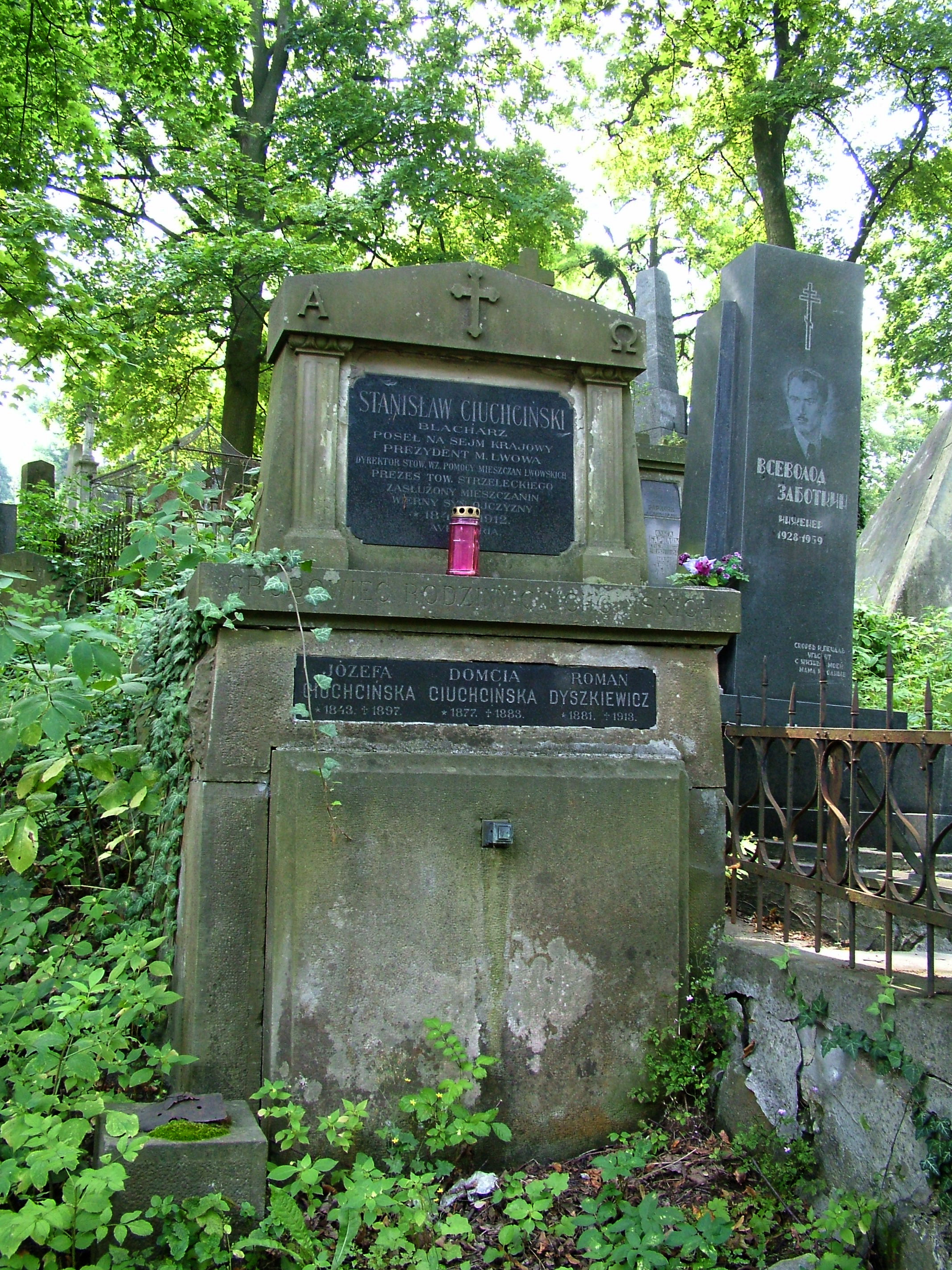 Grób Stanisława Ciuchcińskiego na cmentarzu Łyczakowskim we Lwowie. Autor: Stanisław Kosiedowski. 6 Sierpnia 2007.